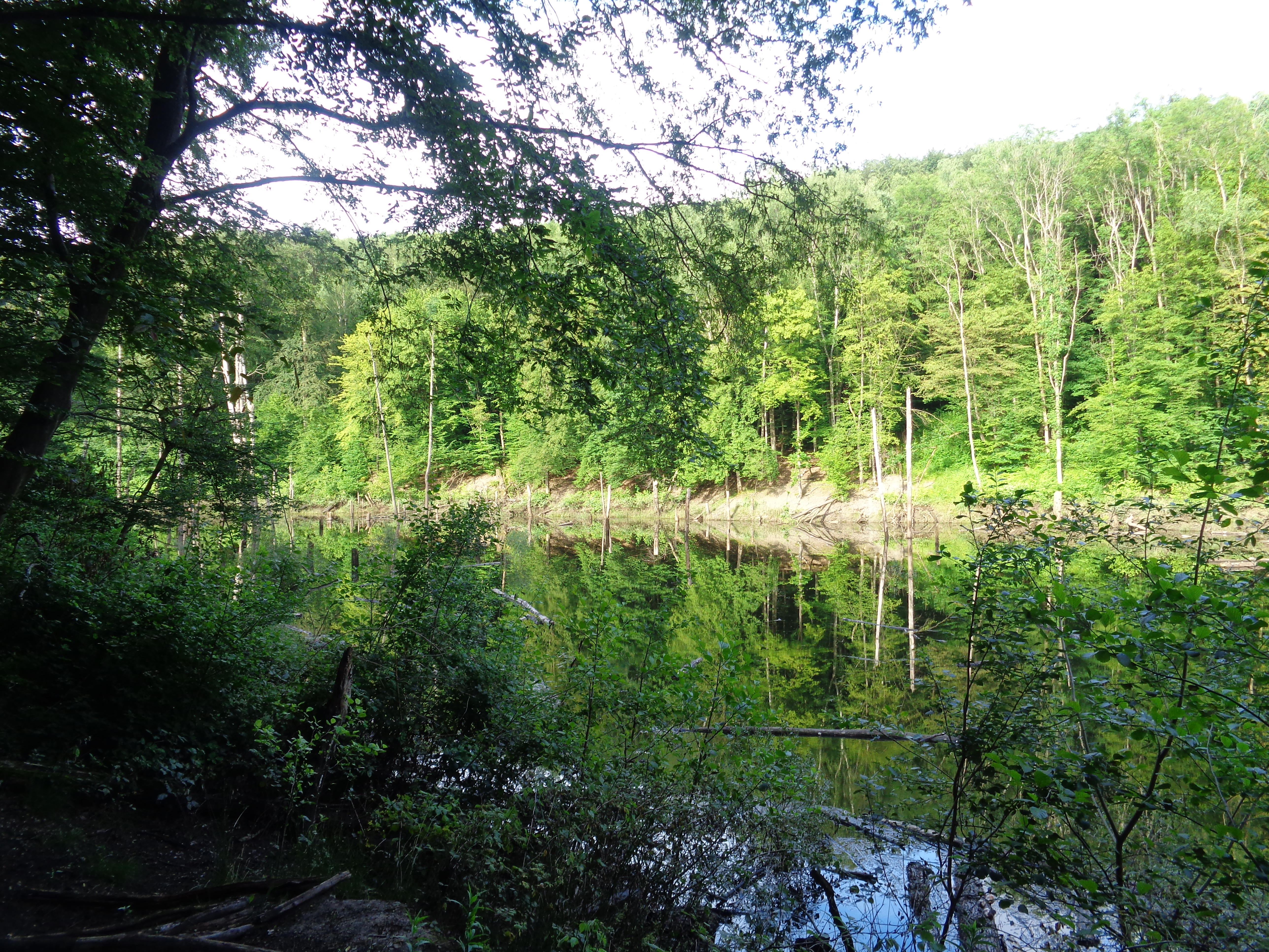 Steinbachstau